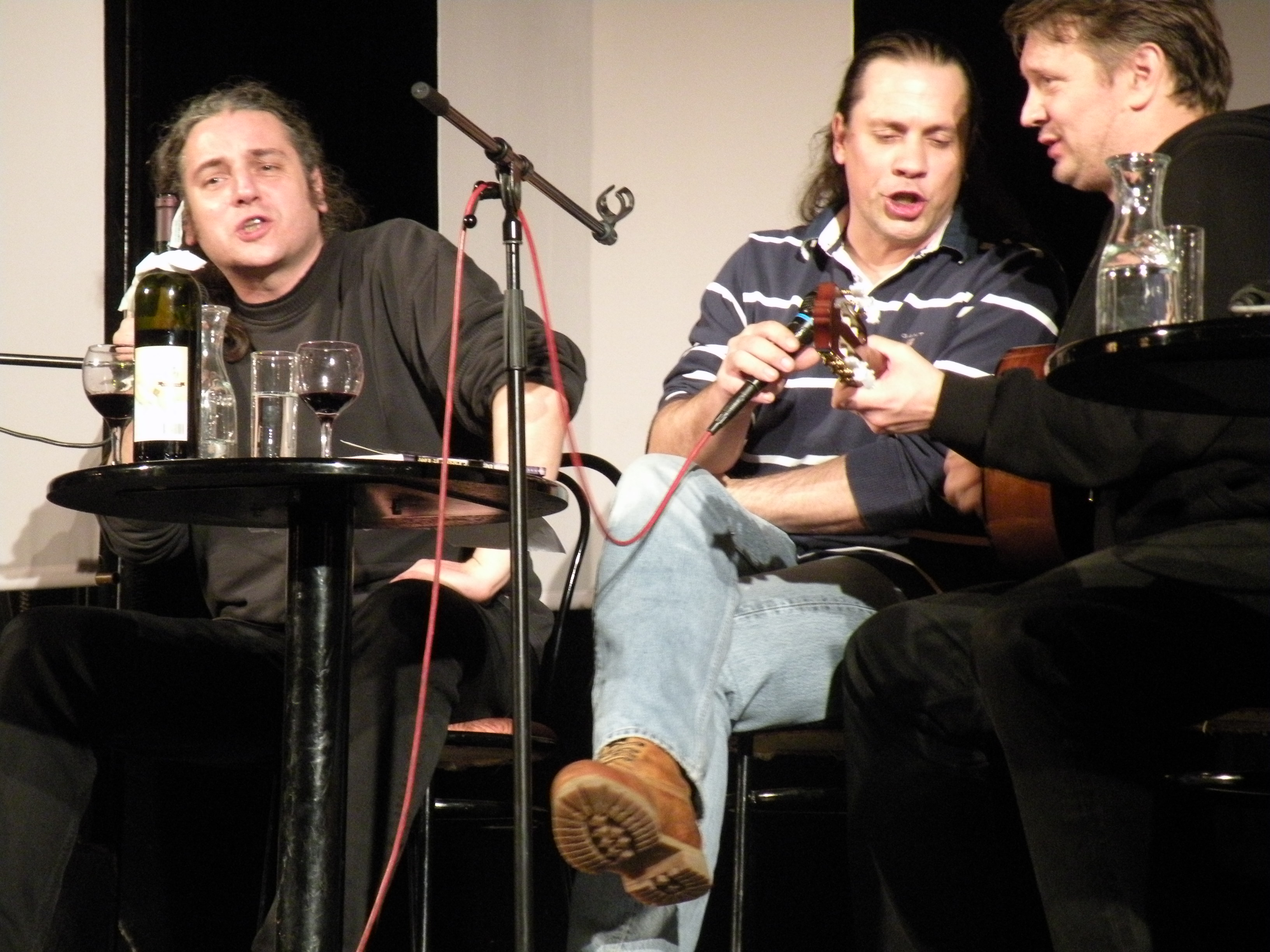 Predrag Lucic, Boris Dezulovic, Benjamin Isovic